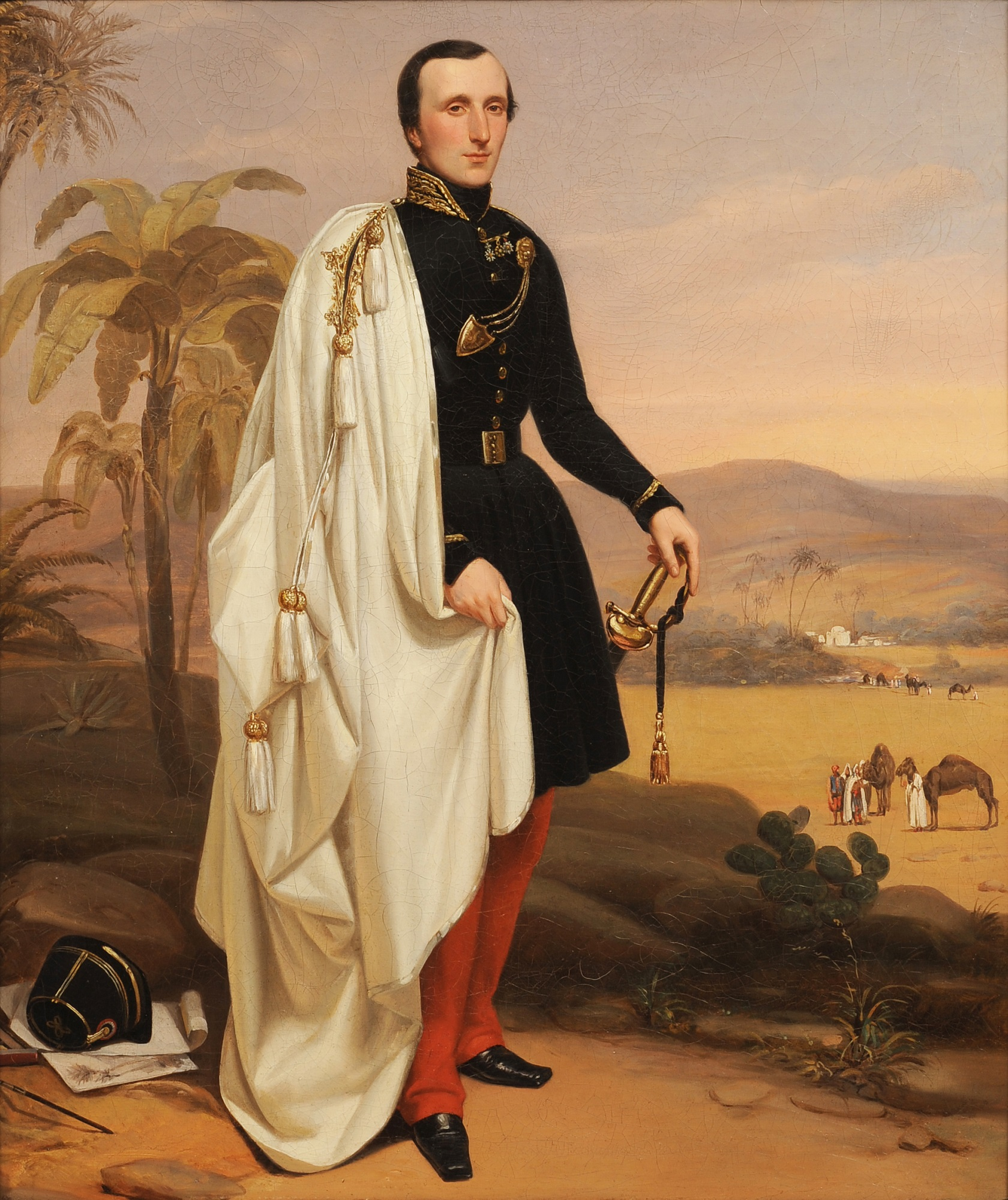 École française du milieu du XIXe siècle Portrait d’un médecin de l'Armée d’Afrique, en Algérie vers 1850 (Musée de l'Armée, Paris) Huile sur toile - 80 x 67 cm Paris, Musée de l’Armée Photo : Galerie de Frise